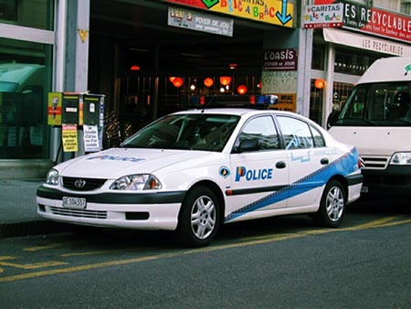 Toyota-Fahrzeug der Polizei aus der Schweizer Stadt Genf